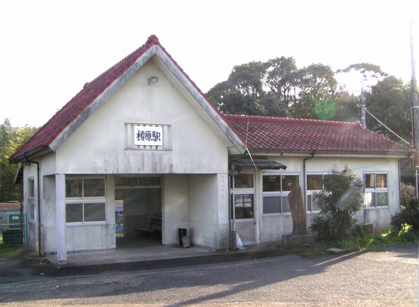 2005年3月30日に投稿者が榎原駅にて撮影。